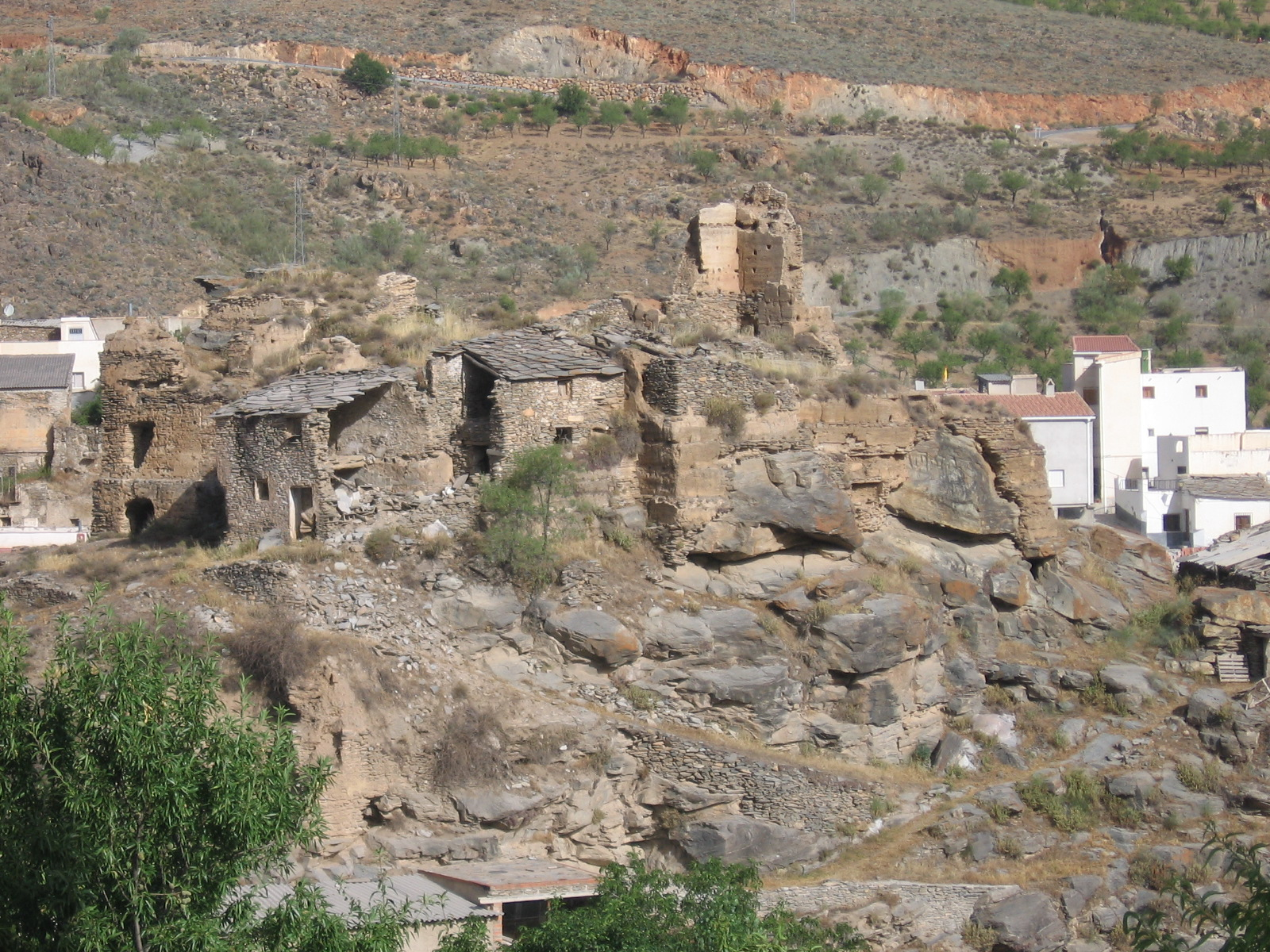 Castillo de Bacares, España.